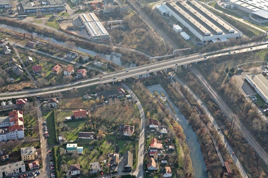 Bielsko-Biała, dzielnica Komorowice. Widok z lotu ptaka na rzekę Białą, ul. Niepodległości, linię kolejową nr 139, zakłady Fiat Auto Poland i osiedle domów jednorodzinnych.